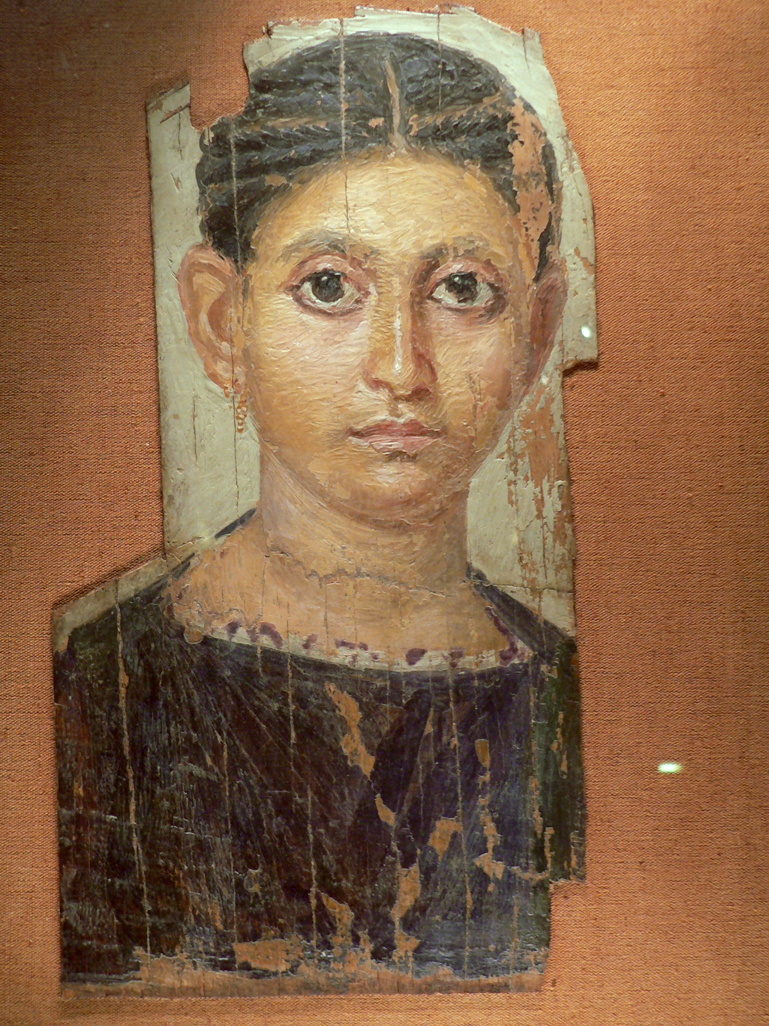 Portrait de jeune femme habillée d'un vêtement pourpre. Fin du III° siècle. Antinoé ? Bois de sapin peint à l'encaustique. H.: 32 cm, L.: 18 cm. Boucles d'oreille en forme de grappe de raisin. Coiffure à la mode stricte des Sévères.